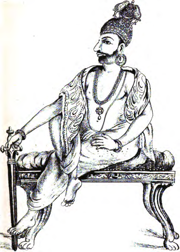 Marthanda Vurmah Maha Rajah